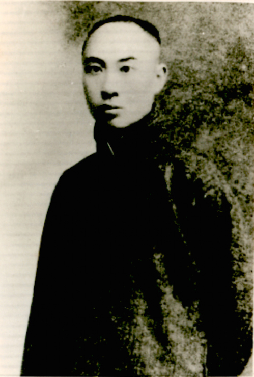 王光祈在德国